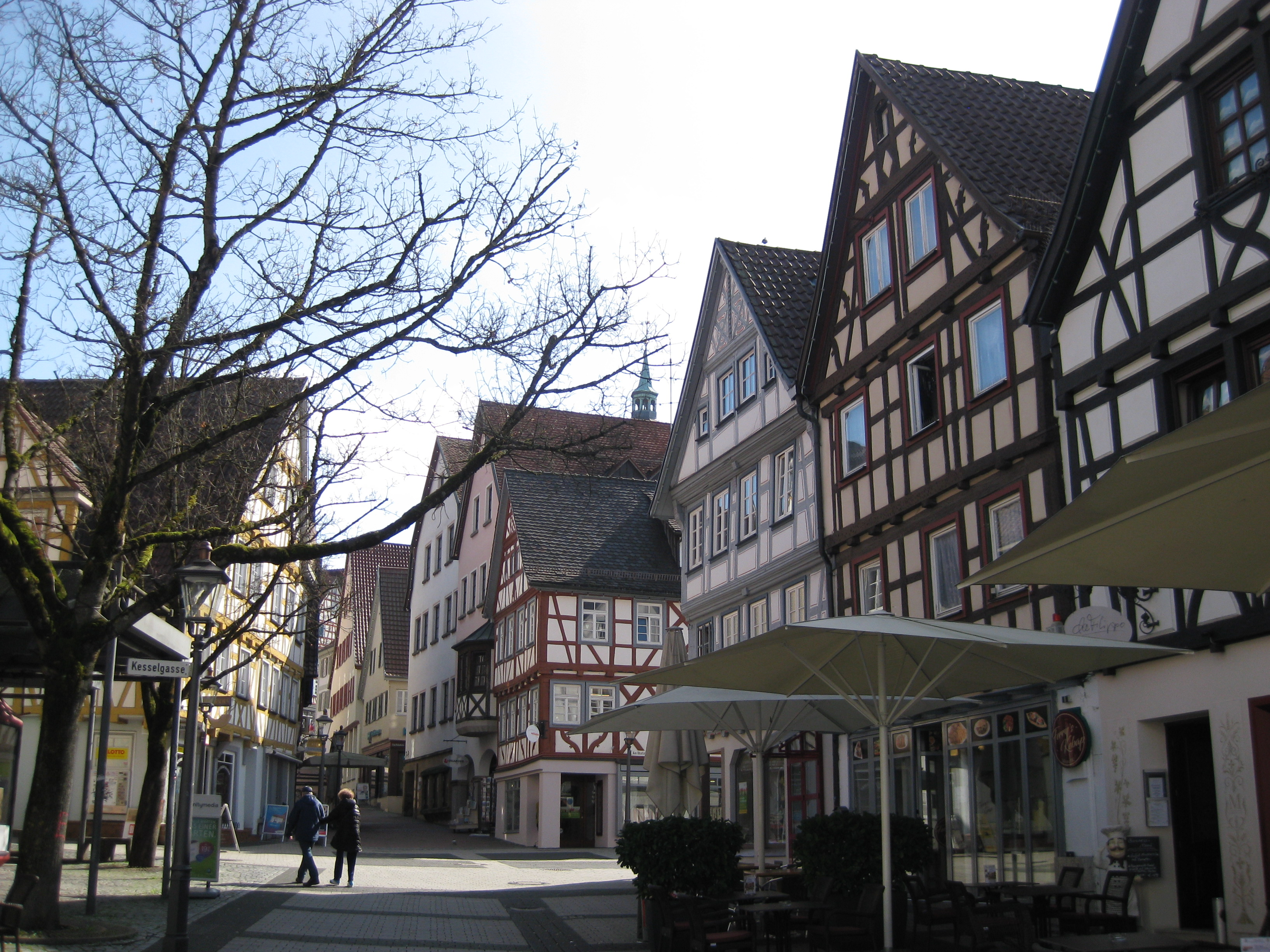 Backnang Schillerstr Ecke Kellergasse